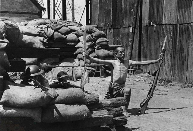 中文（中国大陆）: 在与日军的对峙中，一名29军战士在阵前摆出蔑视敌人的姿势。三分钟后他被敌人击中。